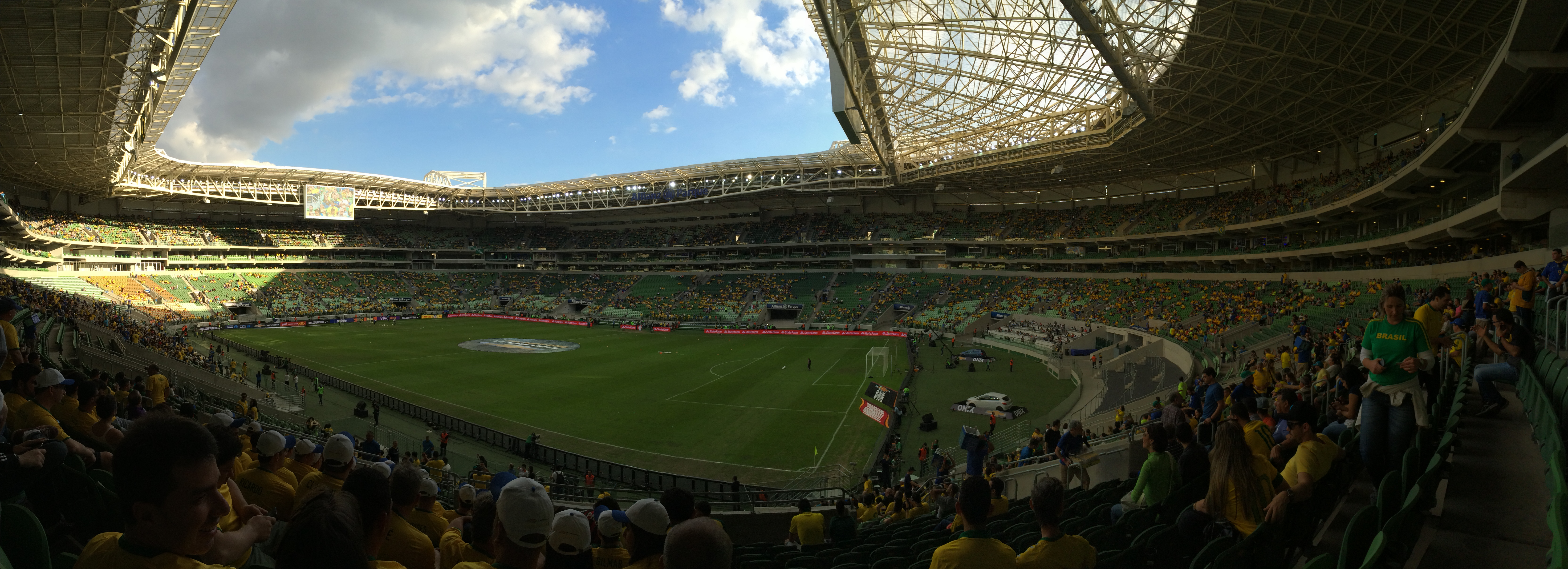 Allianz Parque